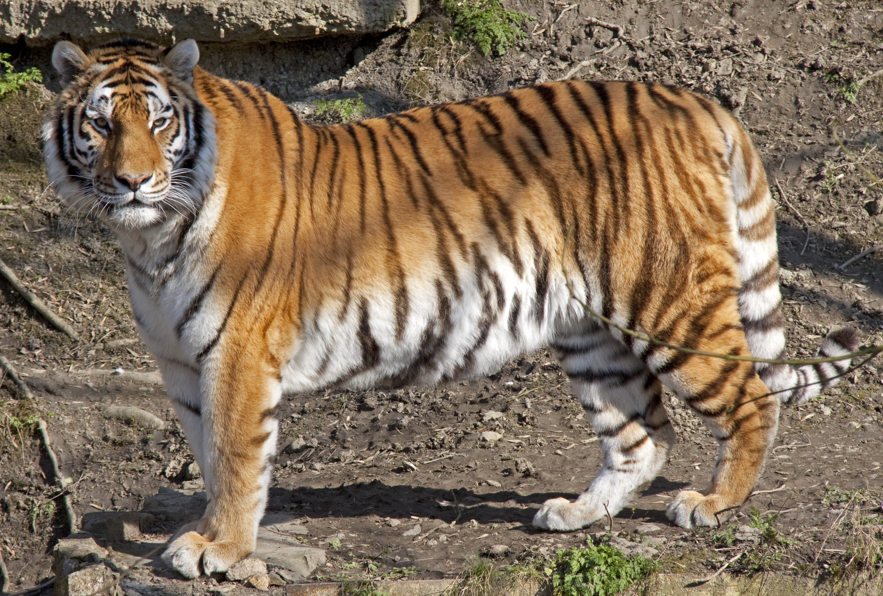 Amur Tiger 4d